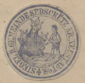 Siegel der Gemeinde Sedschütz, Oberschlesien